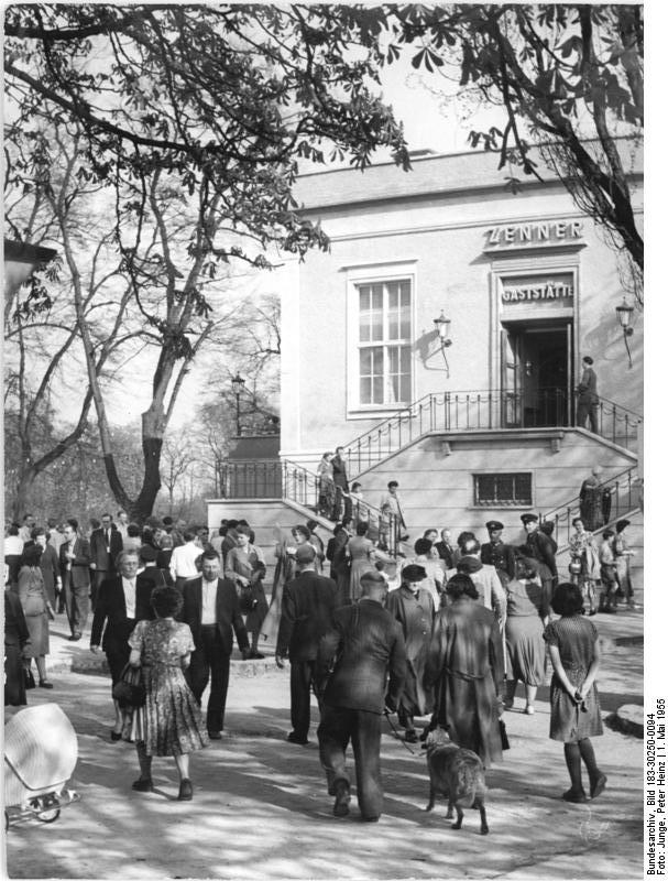 Berlin, Treptow, Gaststätte "Zenner" Zentralbild Junge 1.5.1955 1. Mai 1955 in Berlin. Traptow: Gaststätte Zenner, Hochbetrieb